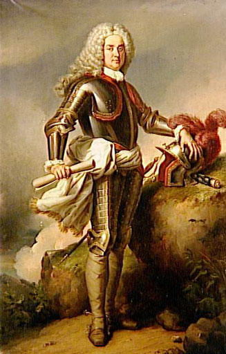 François de Franquetot de Coigny (1670-1759), duc de Coigny, marechal de France